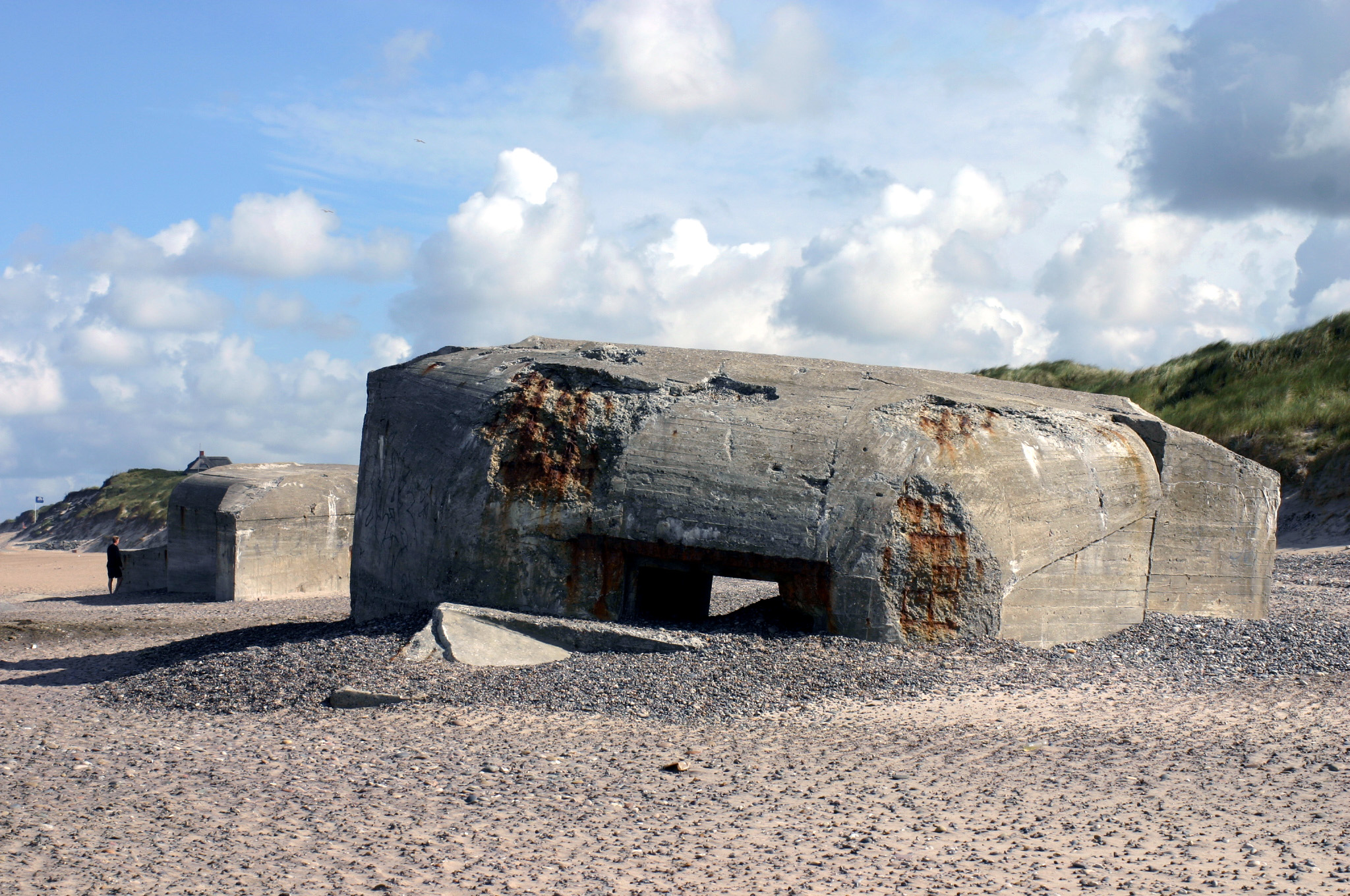 Søndervig, Denmark, German bunker at the beach